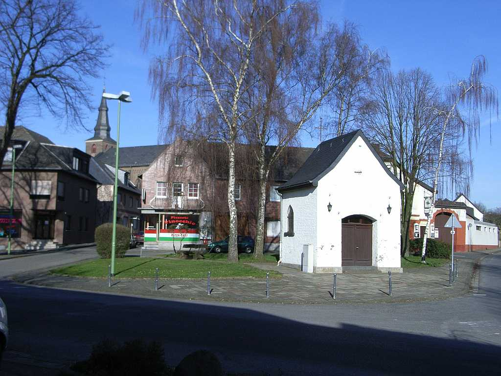 Titz-Rödingen, NRW